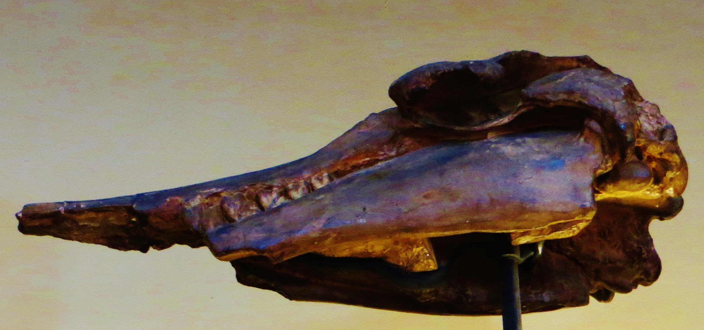 Fossil of Squalodon, an extinct mammal - Took the photo at Musee d'Histoire Naturelle, Paris